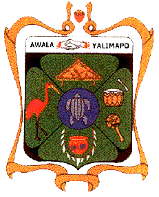 Герб коммуны Авала-Ялимапо, Французская Гвиана